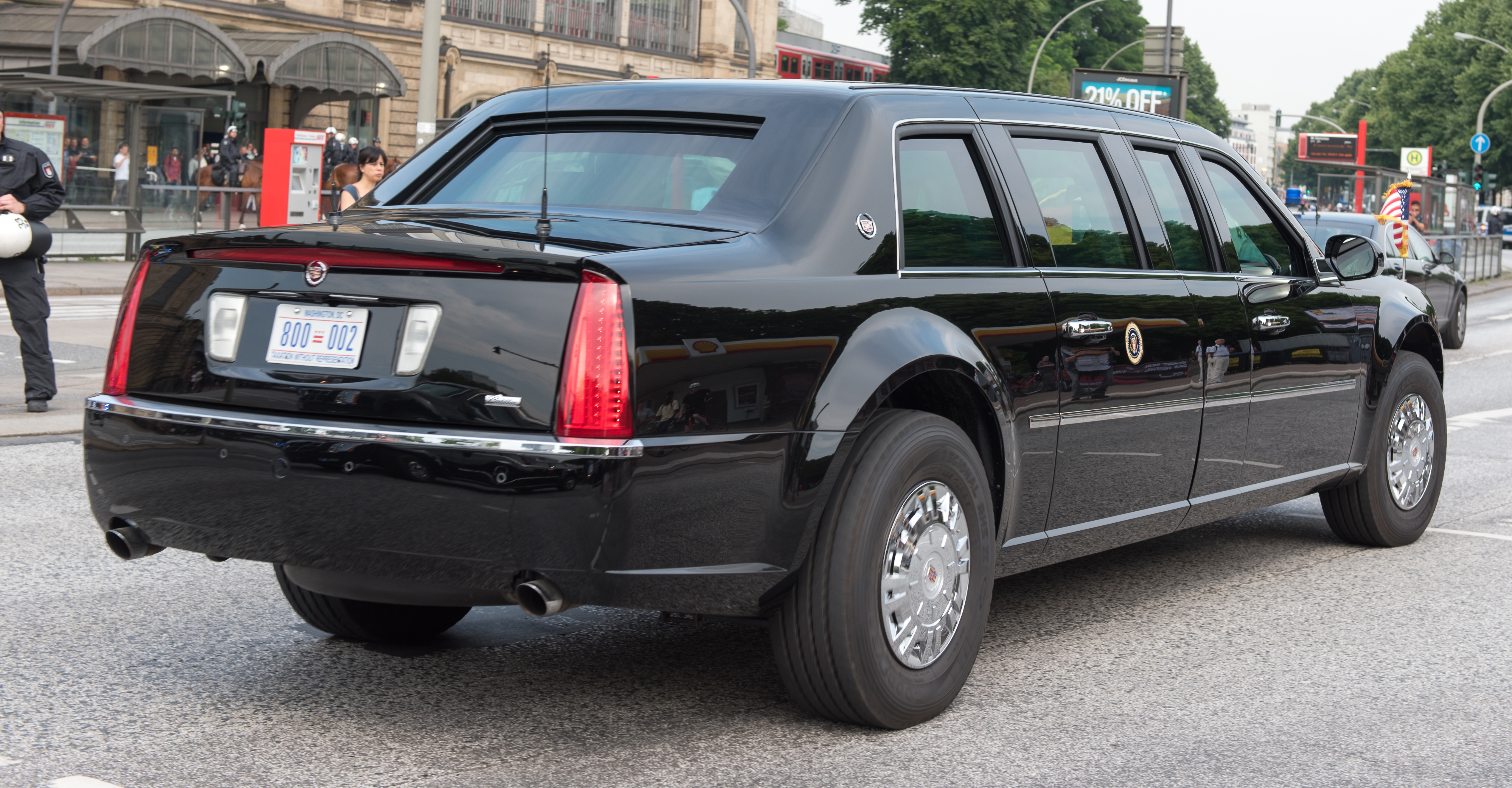 Bilder vom Konvoi des US-Fräsidenten auf dem Weg zu den Messehallen